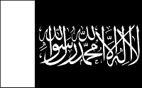 تحریک اسلام پاکستان کا پرچم ہے